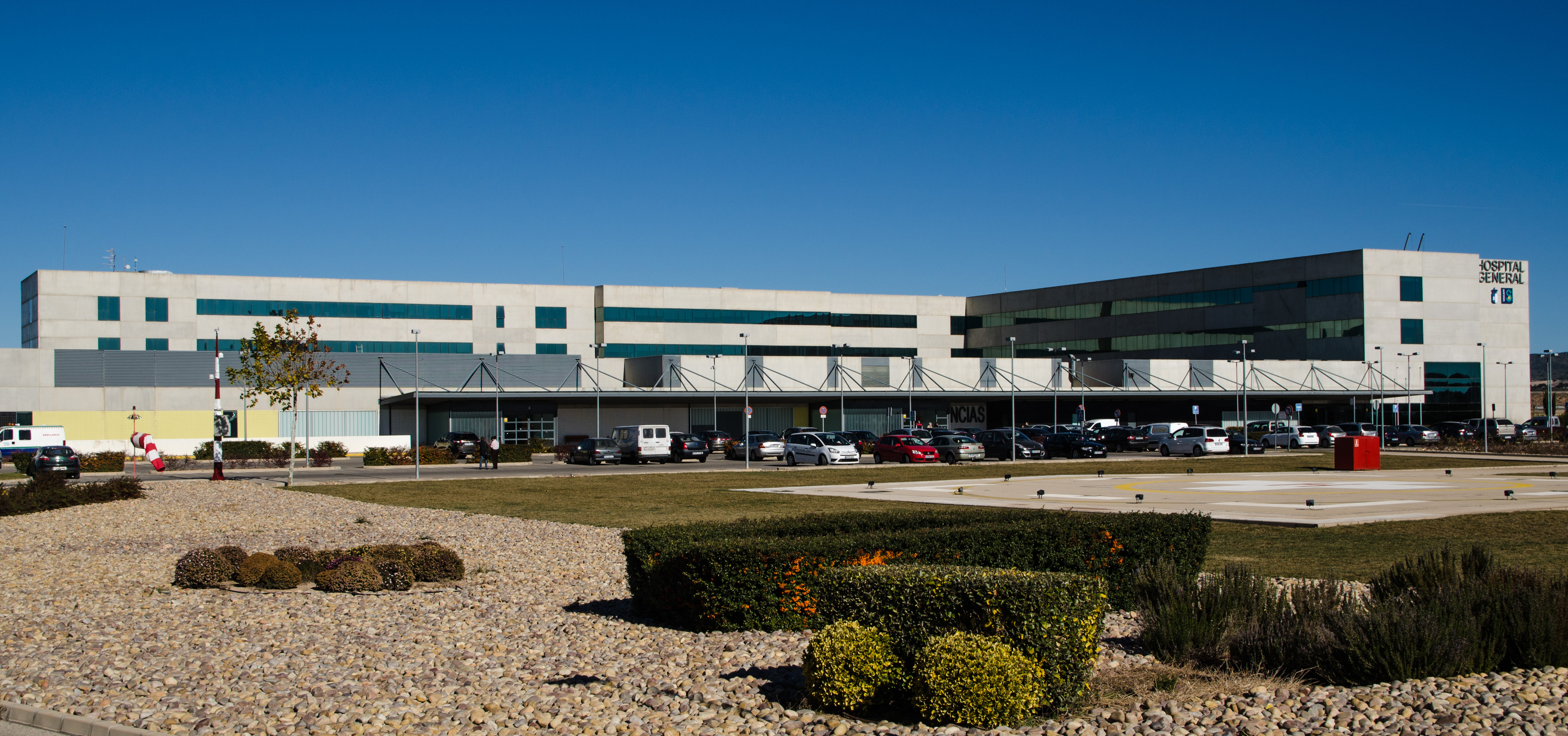 Hospital General de Almansa. Vista General.